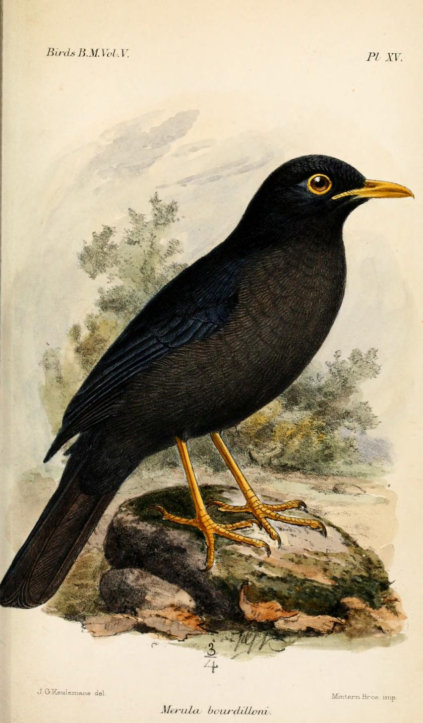 Turdus merula bourdilloni